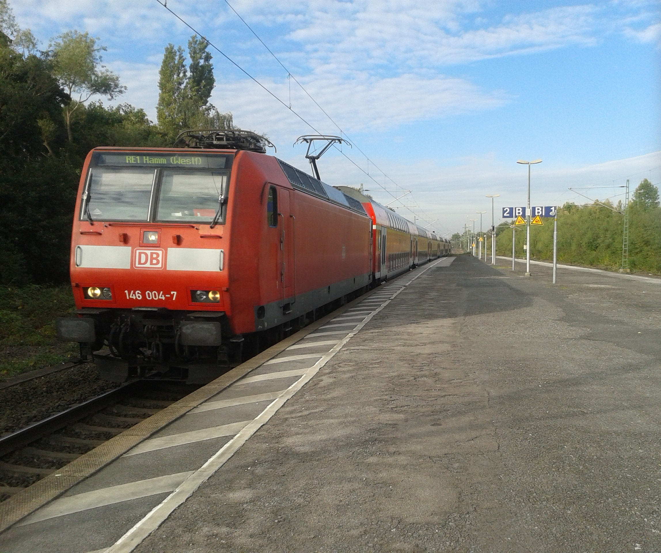 146 004-7 braust mit ihrem aus sechs Wagen bestehendem Doppelstockzug des NRW-Expresses (RE 1) in den Haltepunkt Wattenscheid ein